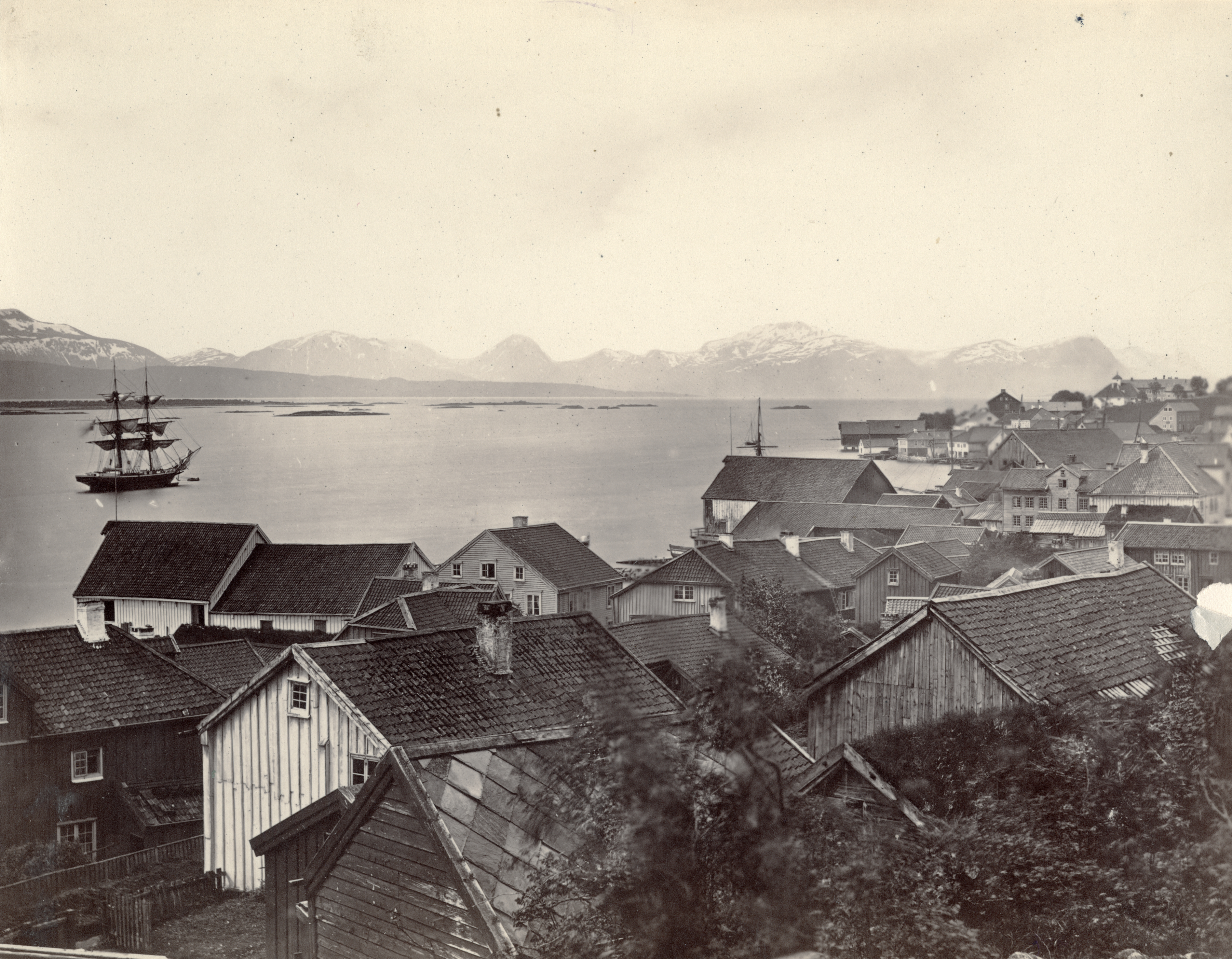 Molde i Molde, Møre og Romsdal This image on crowdsourcing geotagging platform Fotodugnad